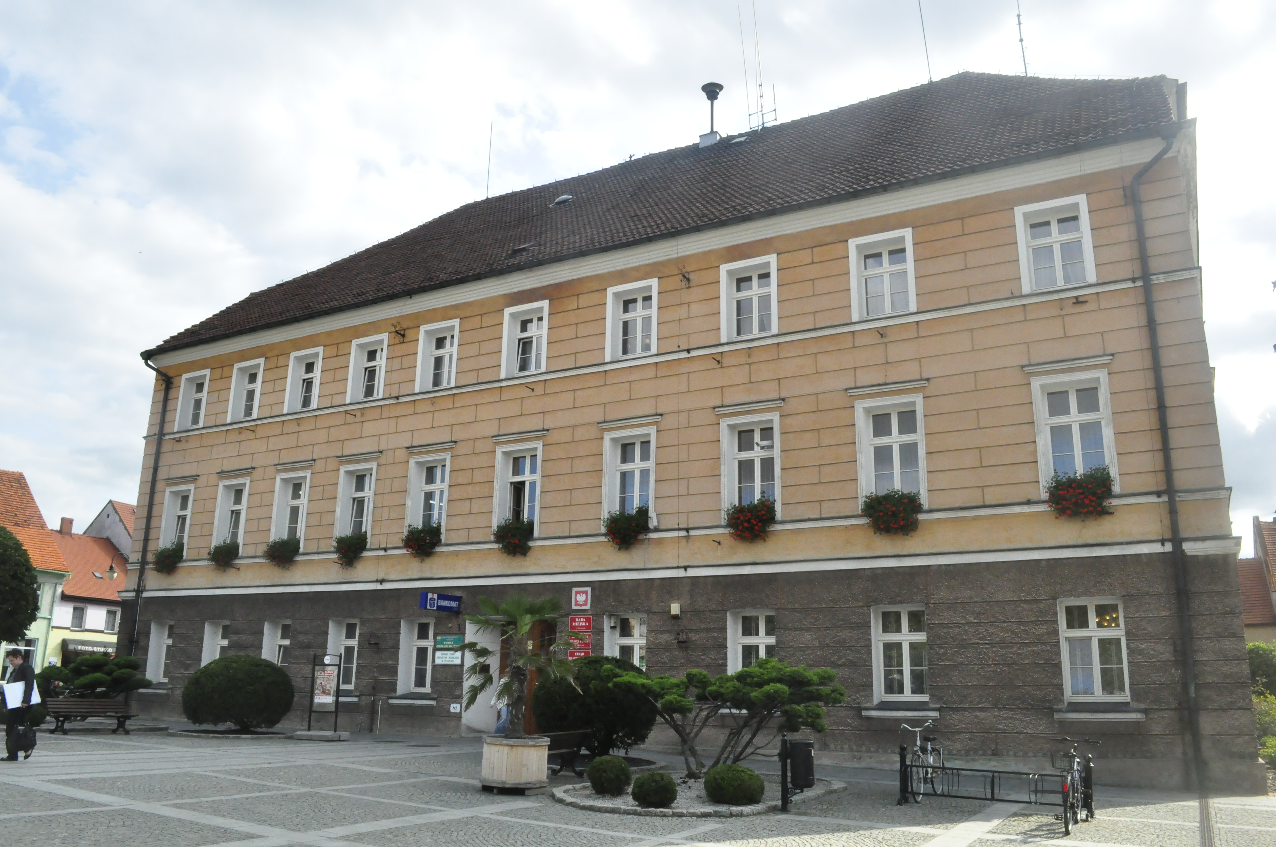 Pleszew - Ratusz